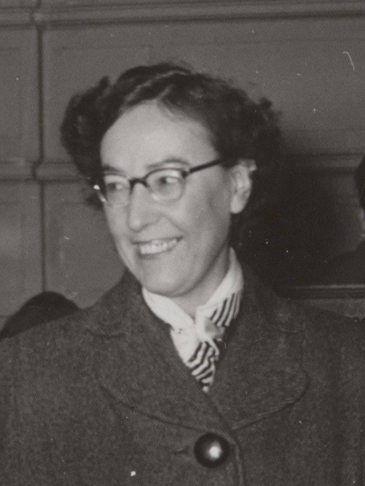 Anna Blaman tijdens de uitreiking van de Reina Prinsen Geerligs Prijs aan de de schrijver W.G. Klooster (24 nov. 1955)